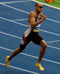 ISTAF Berlin 2006 Marc Raquil Prise en 2006 Mise en ligne le 3 septembre 2006